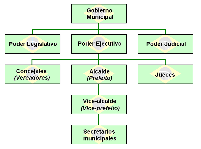 Organigrama de la organización político-administrativa de la ciudad de Santa Rosa, Rio Grande do Sul, Brasil. Author: Leandro Kibisz (Loco085)